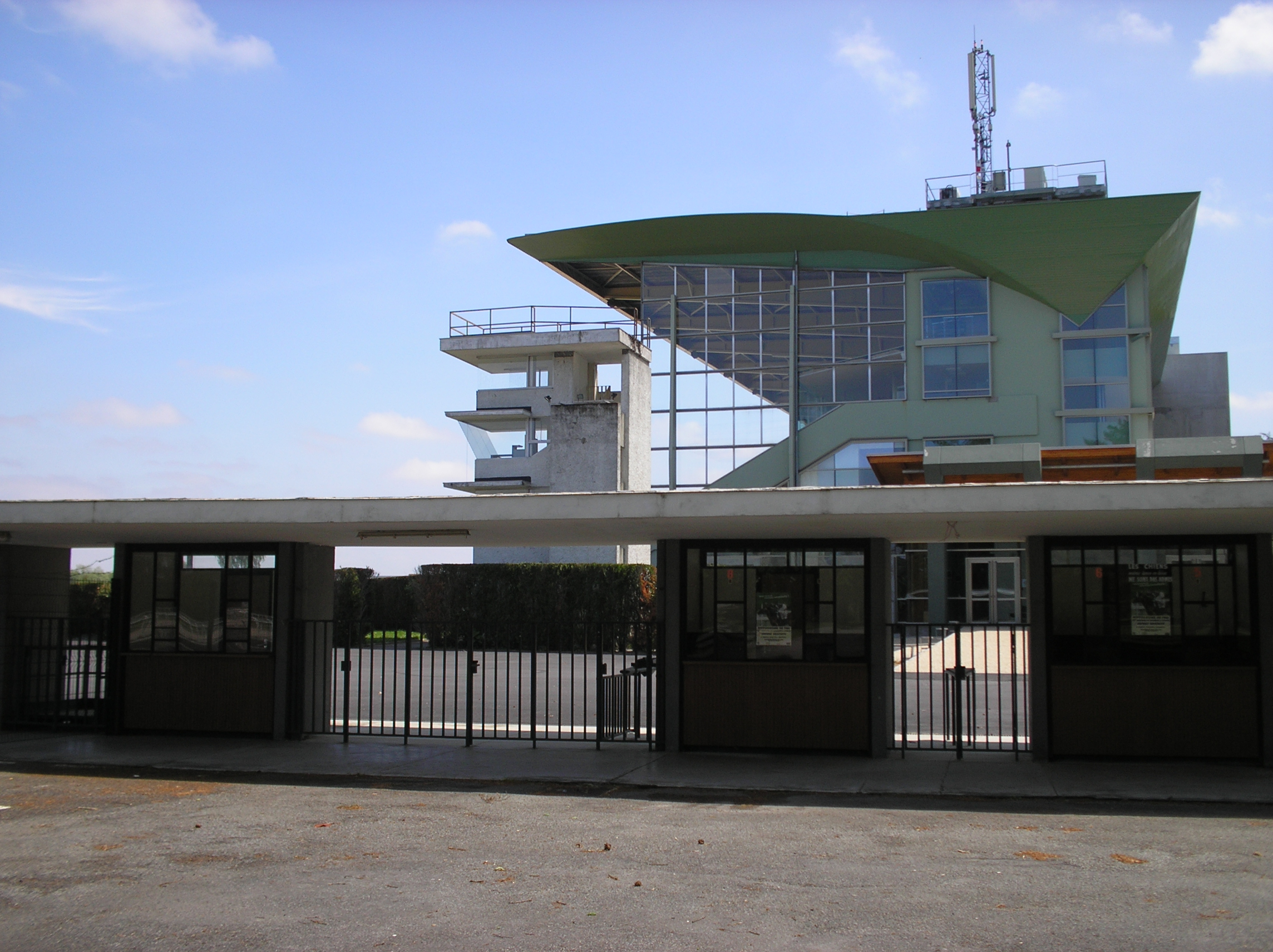 Tribune et guichets de l'hippodrome du Pont Long à Pau